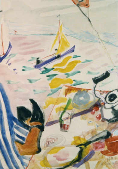 Aquarell von I. Hünerfauth,Ttitel: Am Strand, 1957